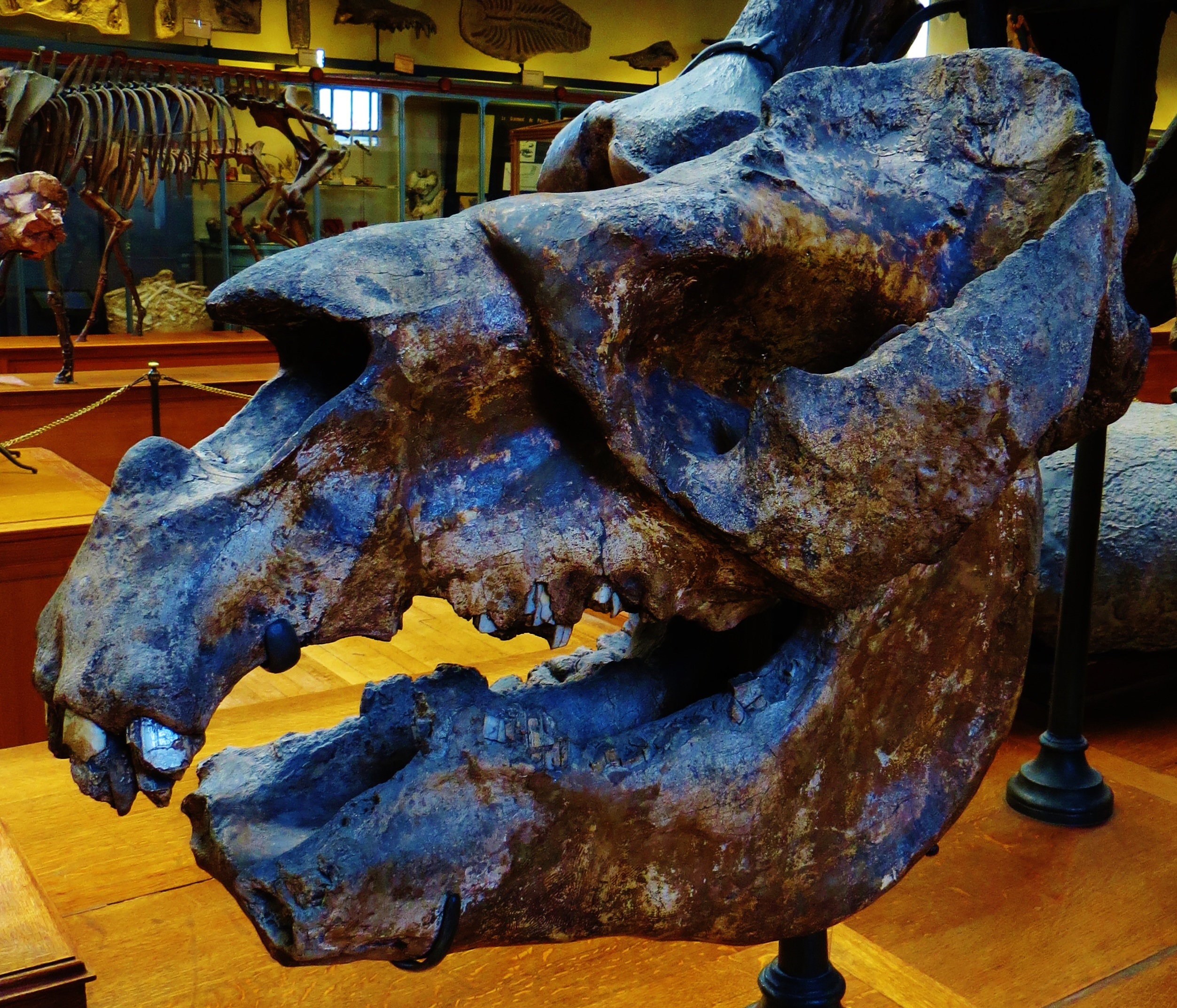 Fossil of Toxodon, an extinct mammal - Took the photo at Musee d'Histoire Naturelle, Paris